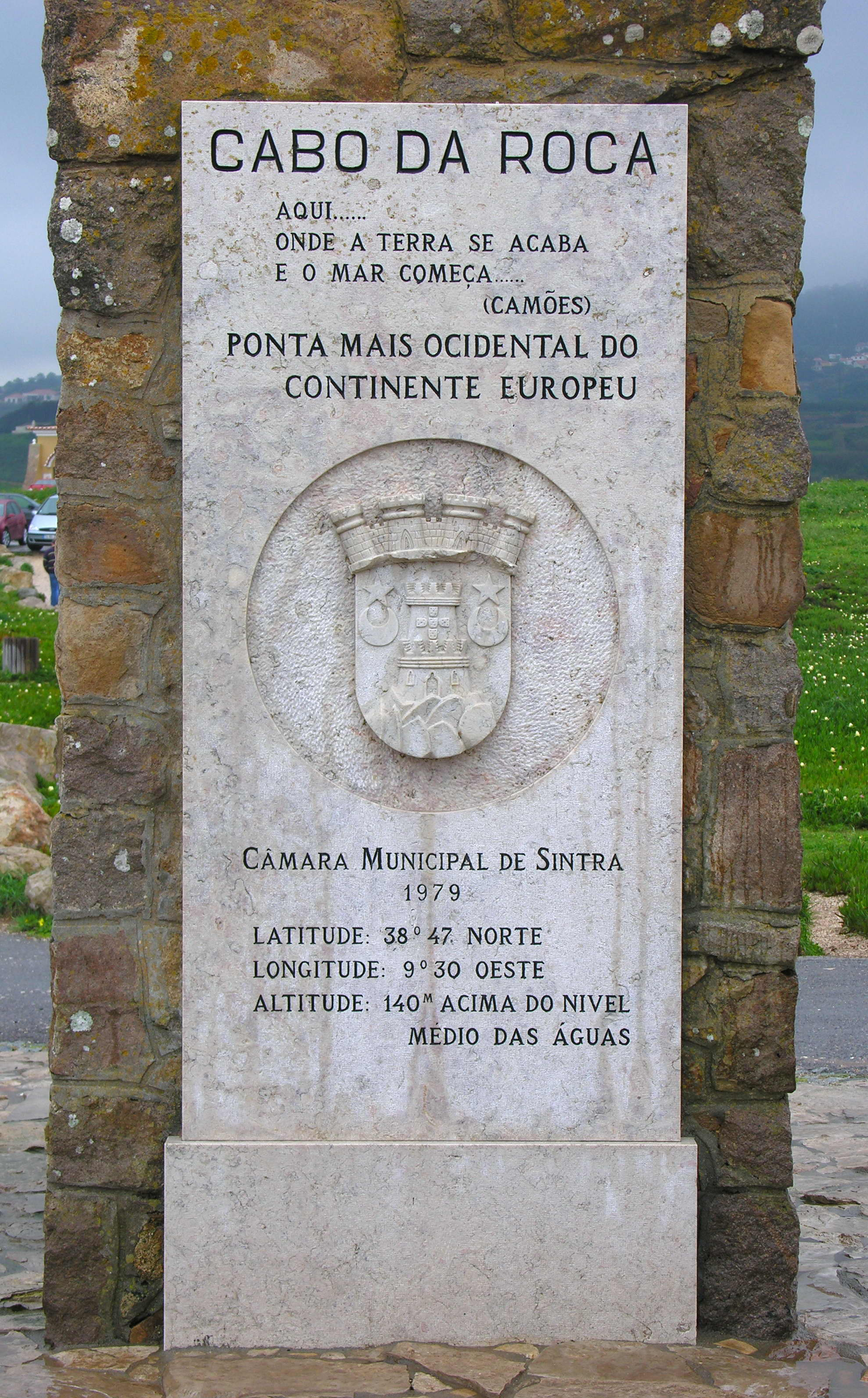 Cabo da Roca, Sintra, Portugal